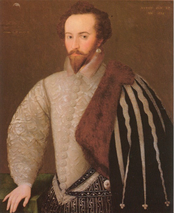 Sir Walter Raleigh